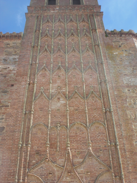 Mudehxara ornamado de la turo